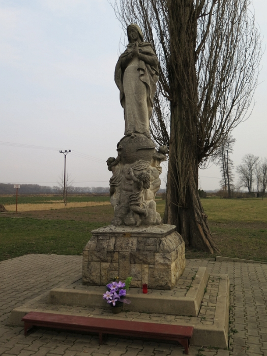 Sousoší Panny Marie a dvou andělů (andělé zničeni) (Křešice), při kostele Navštívení Panny Marie, Křešice, Křešice.